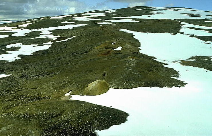 Motiv: Nasafjäll Nyckelord: Flygbilder, Riksintressen Kategori: Gruva Nasafjäll